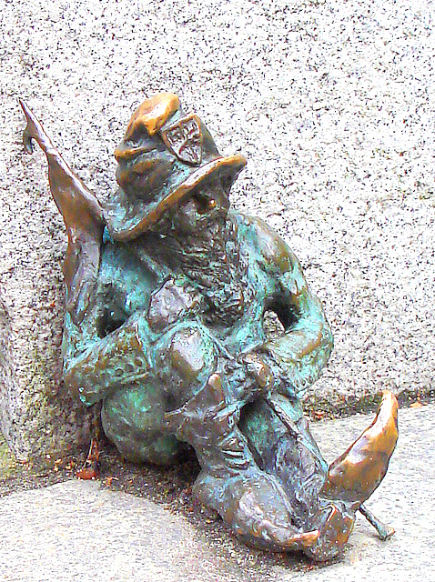 Wrocław, krasnal Śpioch (Strażnik)